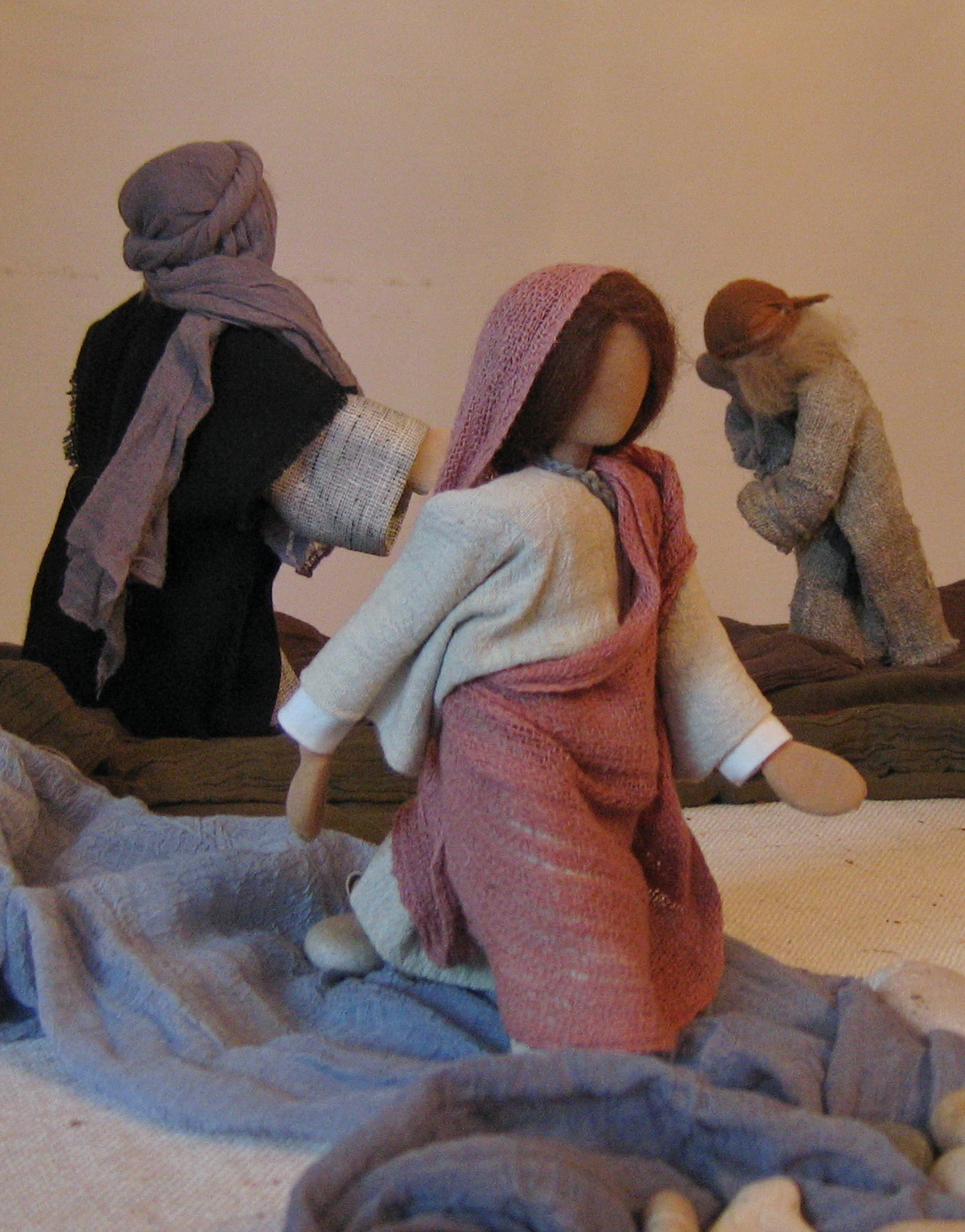 Bewegungsstudien bei einem Werkkurs zur Herstellung Biblischer Figuren